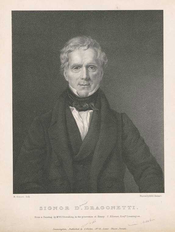 Altersporträt des italienischen Kontrabassisten Domenico Dragonetti (1763-1846)